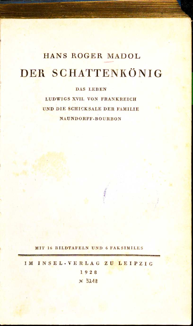 Hans Roger Madol Der Schattenkönig 1928 Titel